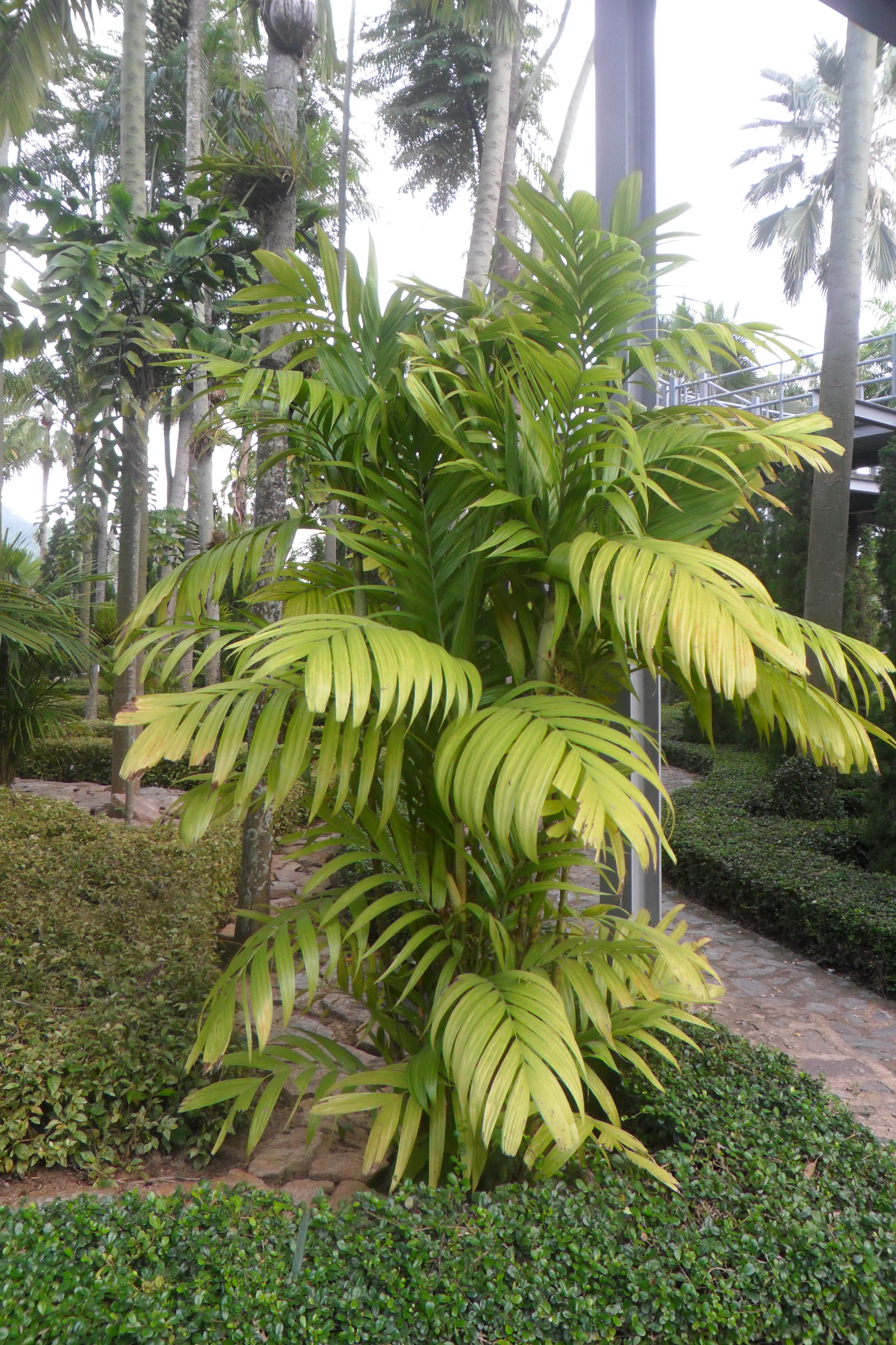 Areca triandra. Nong Nooch Tropical Garden.